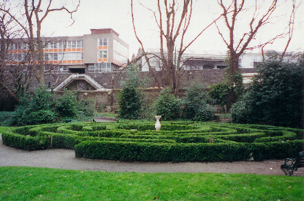 Das Labyrinth im Iveagh Gardens (selbst photographiert)